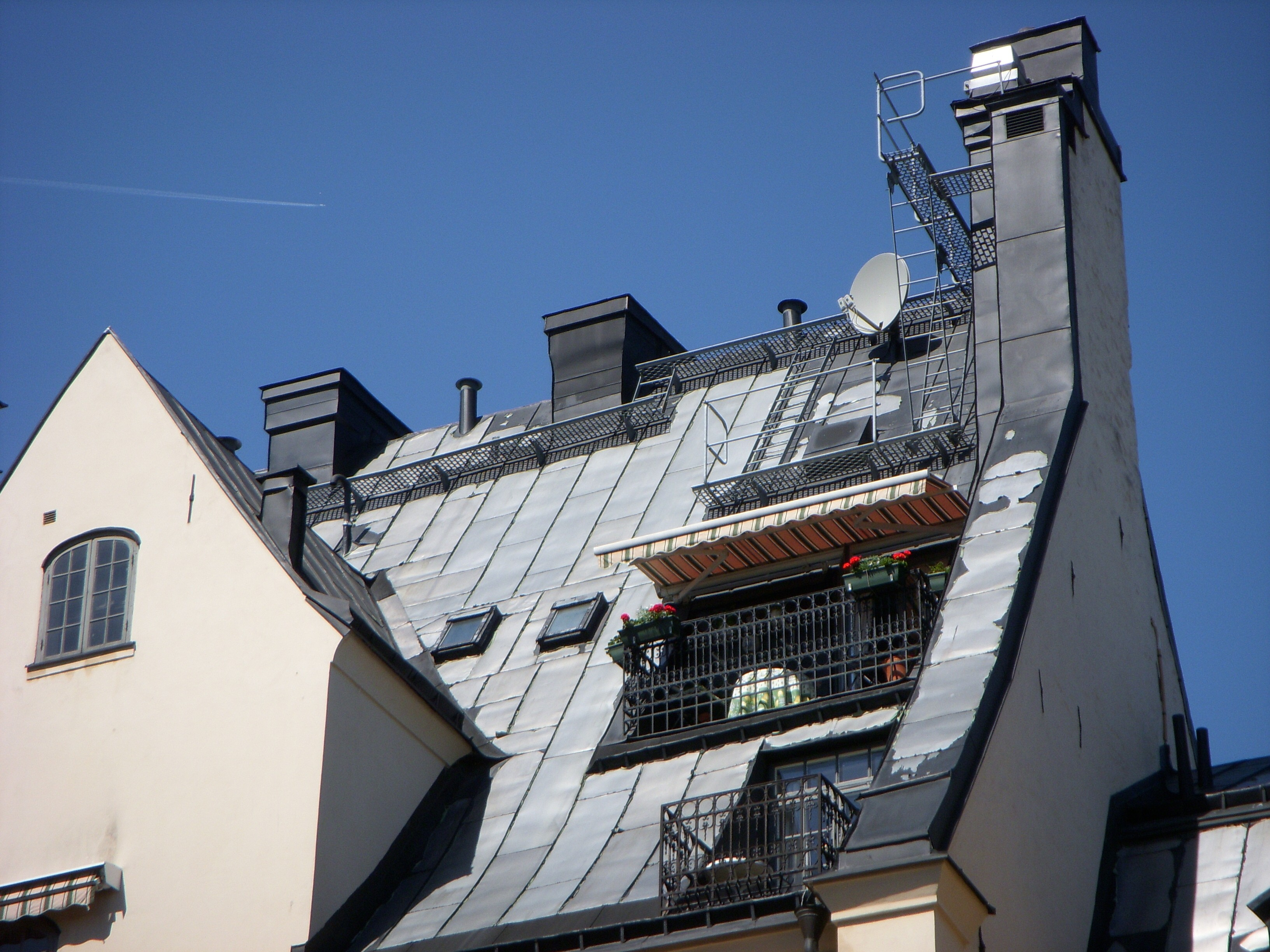 Kvarteret Cepheus i Gamla stan, Stockholm